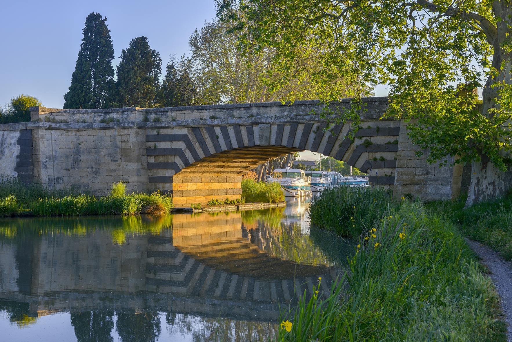 Le canal du Midi en Minervois, au hameau du Somail le canal est enjambe par un elegant pont routier dit pont Neuf datant de 1771, ouvrage d’art du canal protege au titre des monuments historiques, communes de Ginestas et Saint-Nazaire-d'Aude, Aude, France, Europe